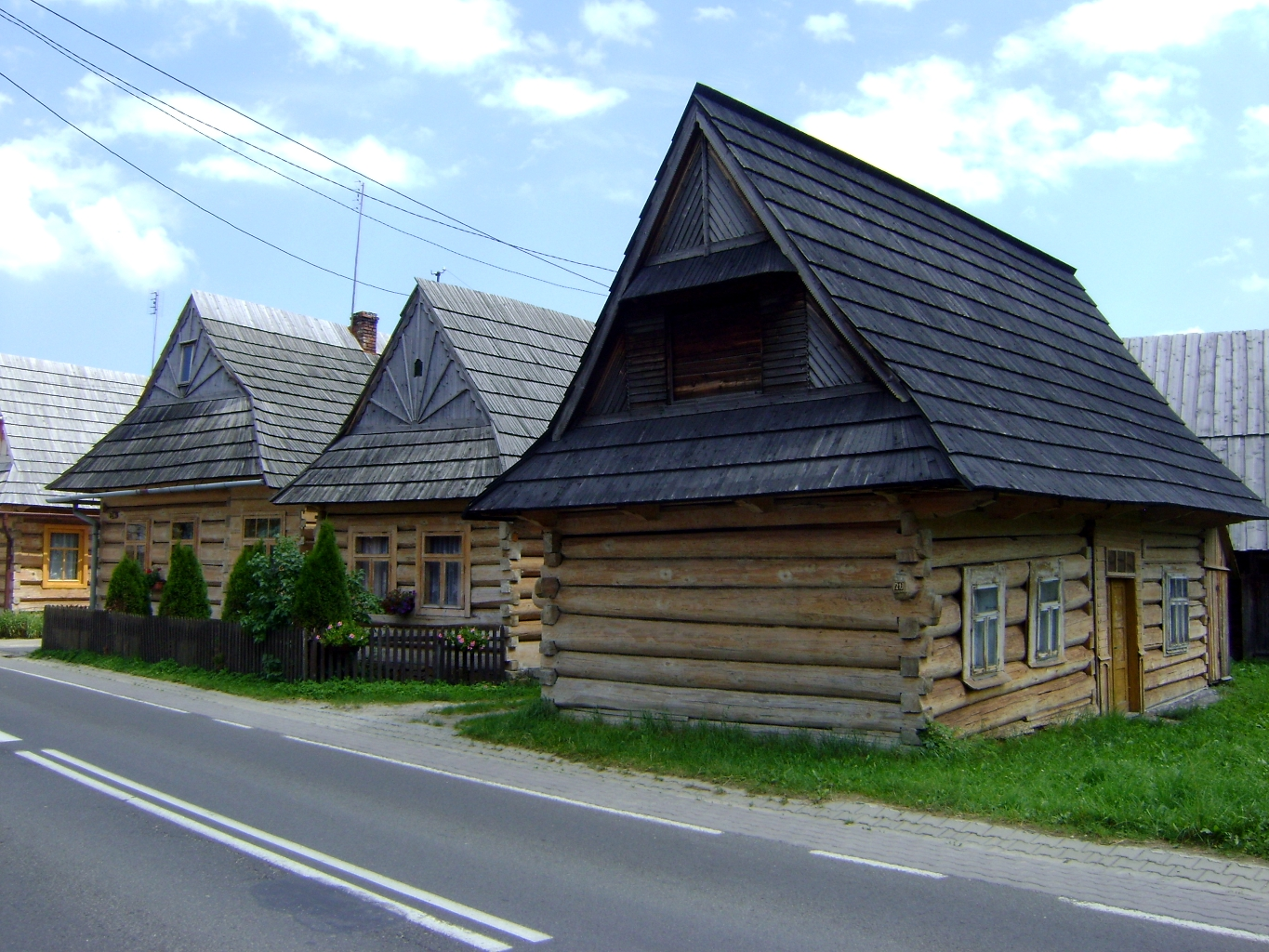 zabudowa Chochołowa